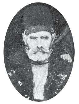 Димитър Кочооглу от село Просечен, Драмско.